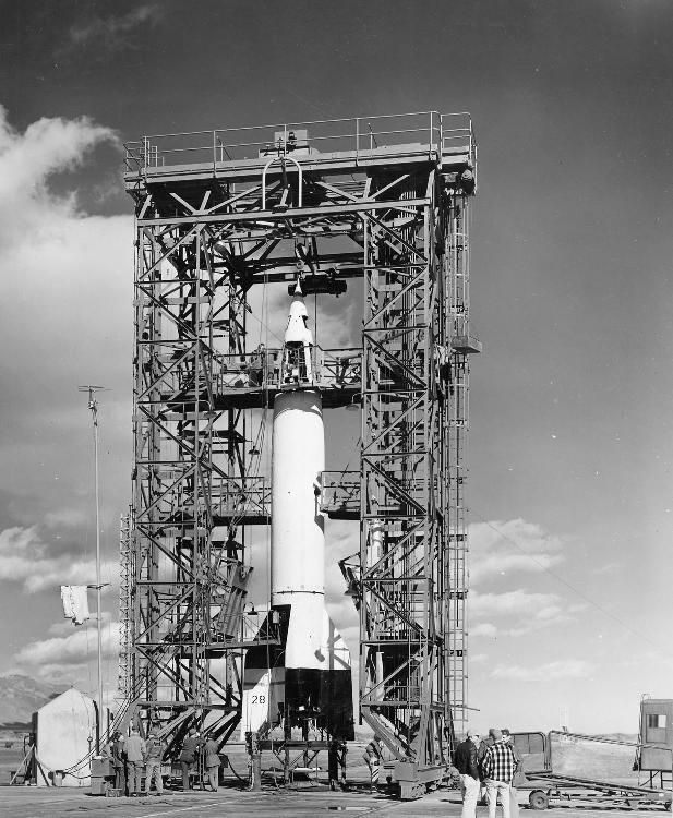 V2 bij Museum-WhiteSands